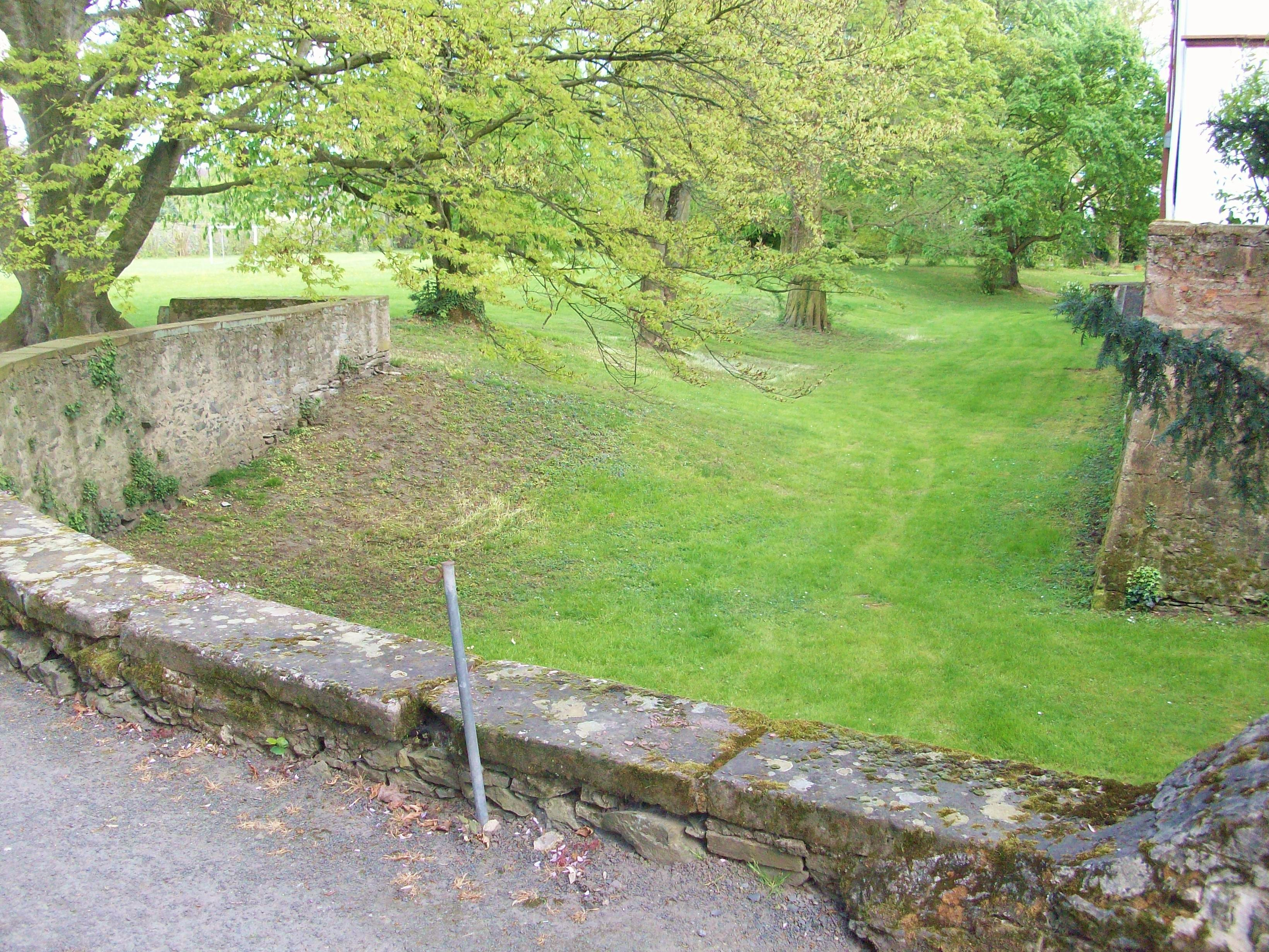 Echzeller Burg (eigentlich heute ein Schloss): der trockengelegte Burggraben der alten Wasserburg